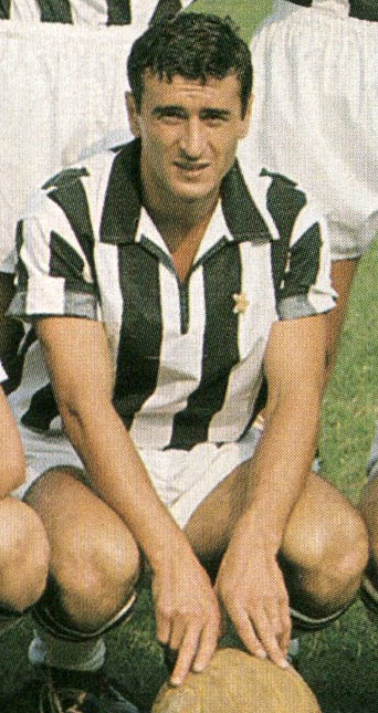 Biella, stadio Lamarmora, 21 agosto 1966. Il calciatore della Juventus, Adolfo Gori, in occasione della vittoriosa amichevole precampionato contro il Biella (3-0).